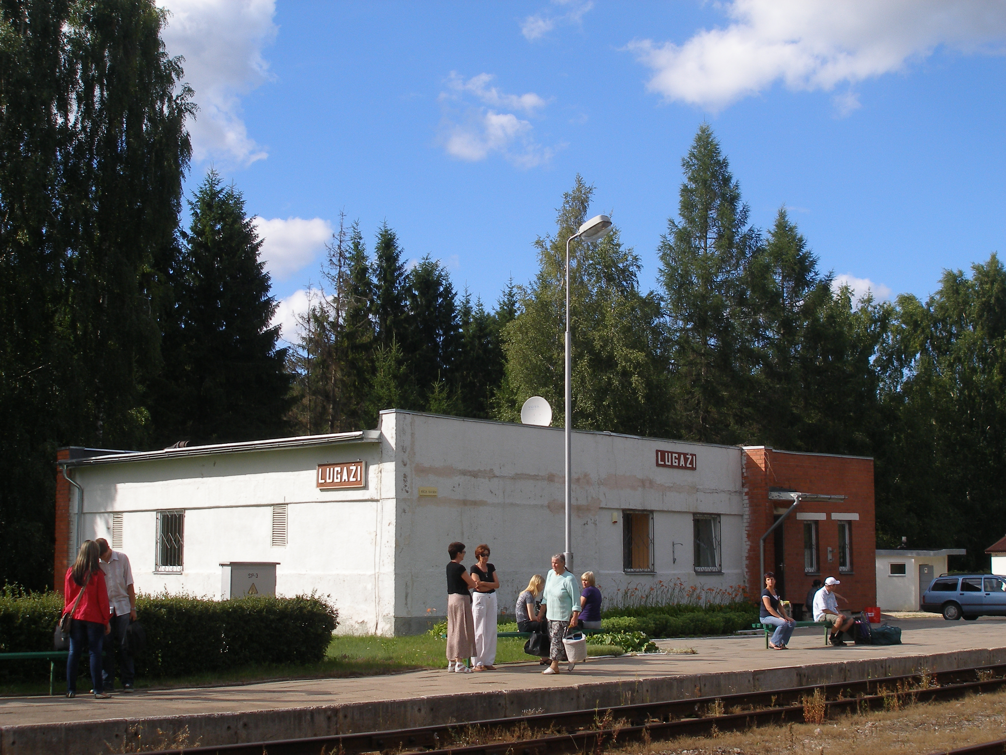 Пассажирское здание станции Лугажи